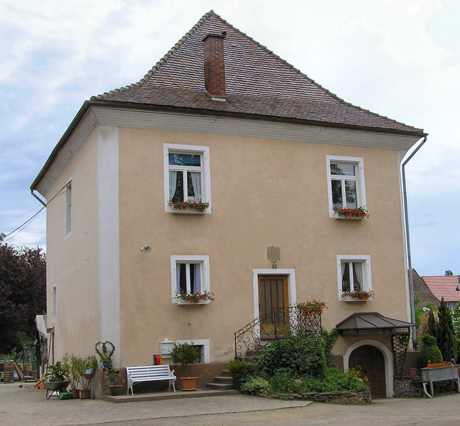 Hof zu tutsch jetzt Weingut Schätzle. (Lehen, Freiburg im Breisgau Germany)